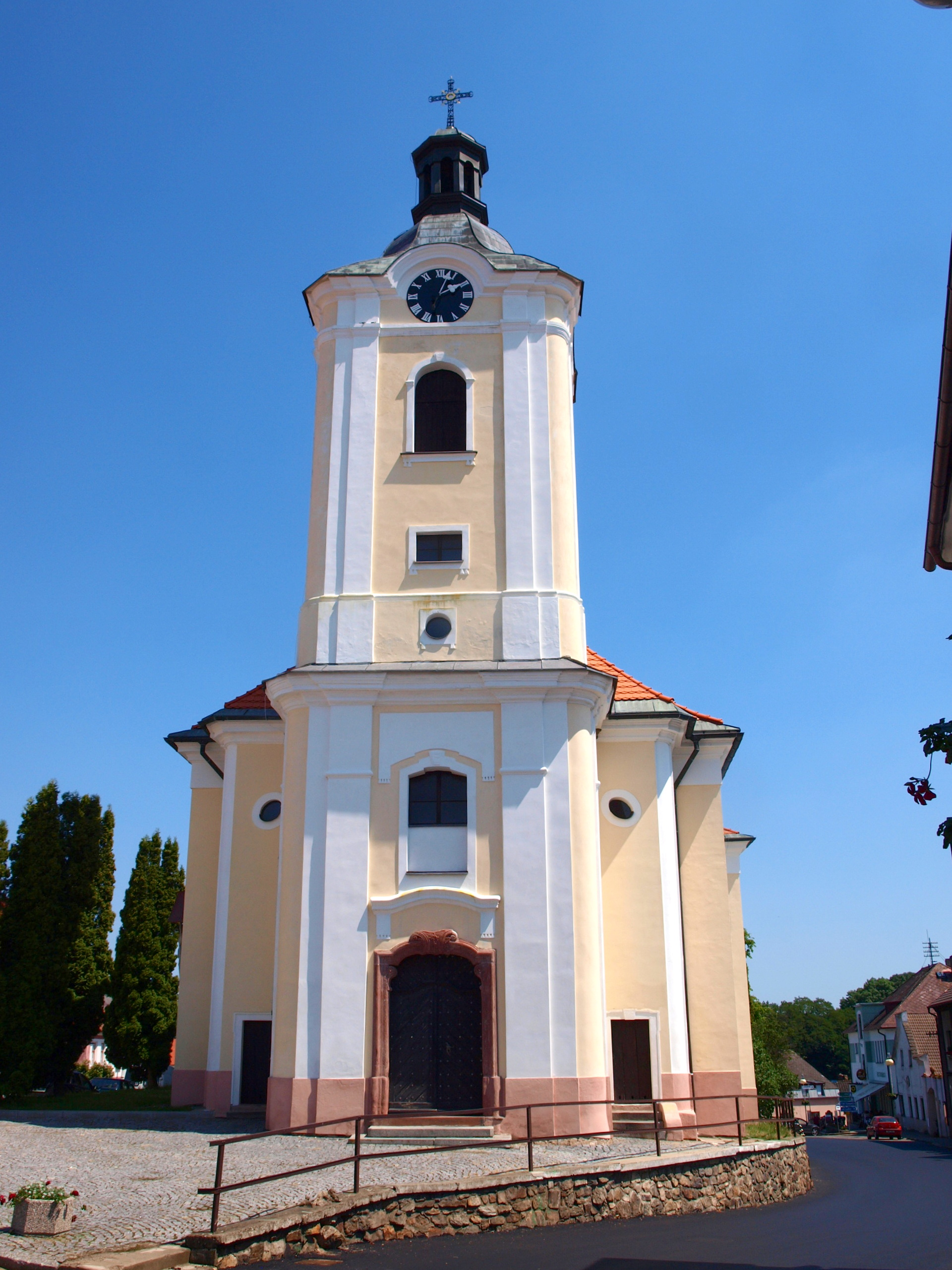 Divišov